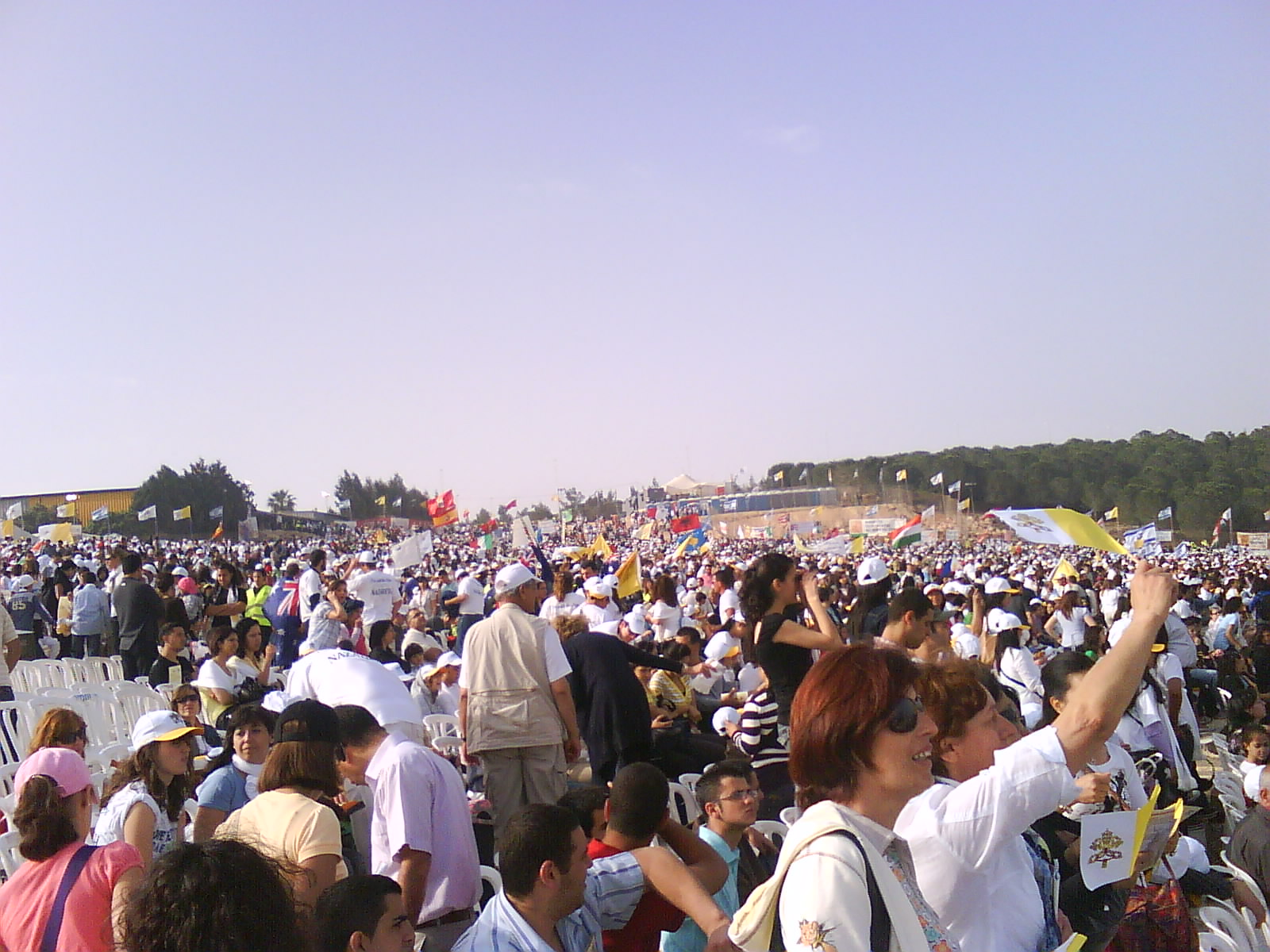 ביקור האפיפיור בנצרת ועריכת המיסה בהר הקפיצה